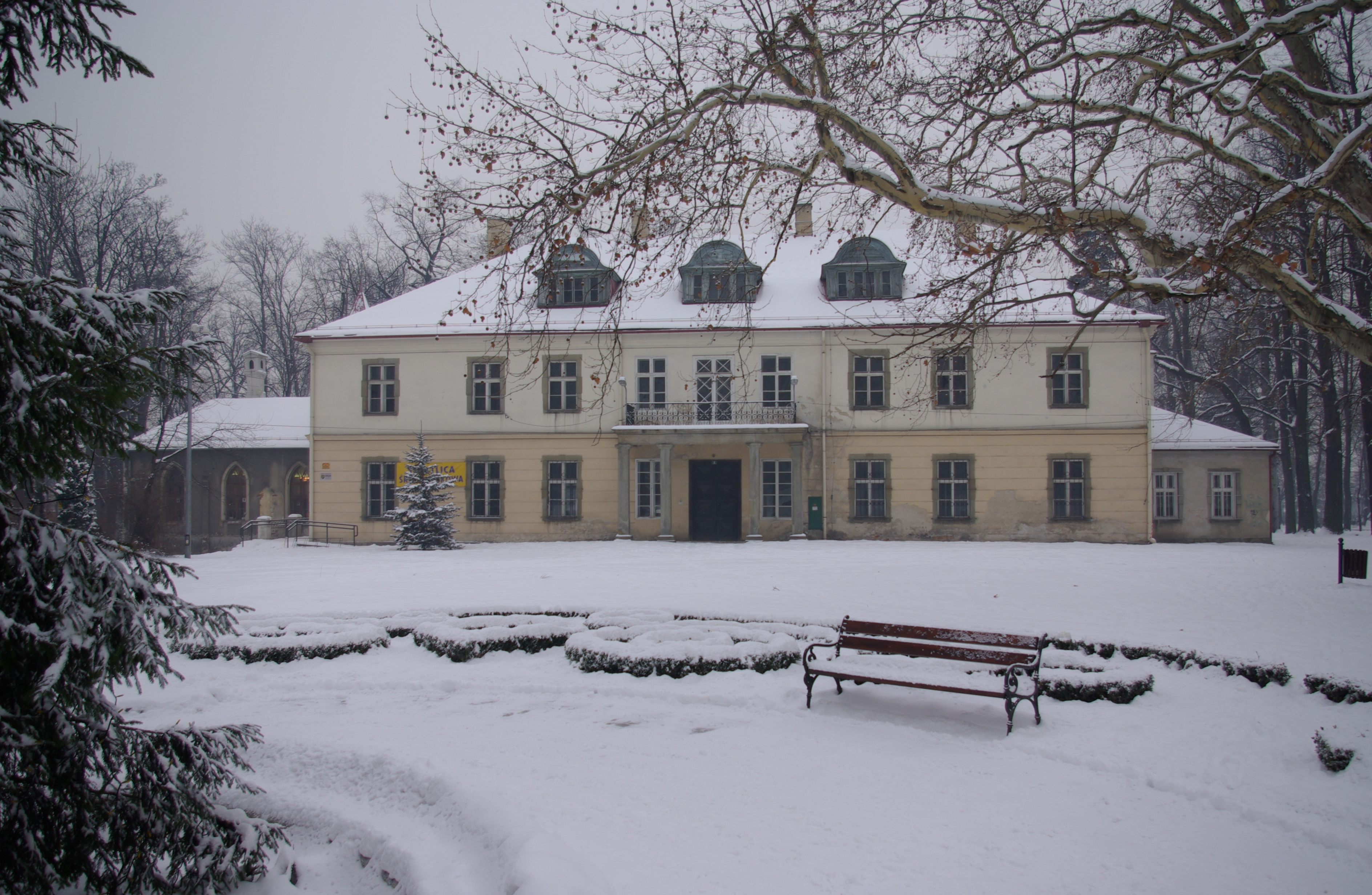 Palac z XVIII wieku w Kozach.